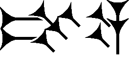 Cuneiform sign